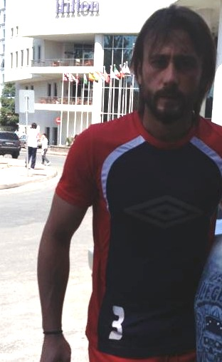 Çağlar Birinci Elazığsporla